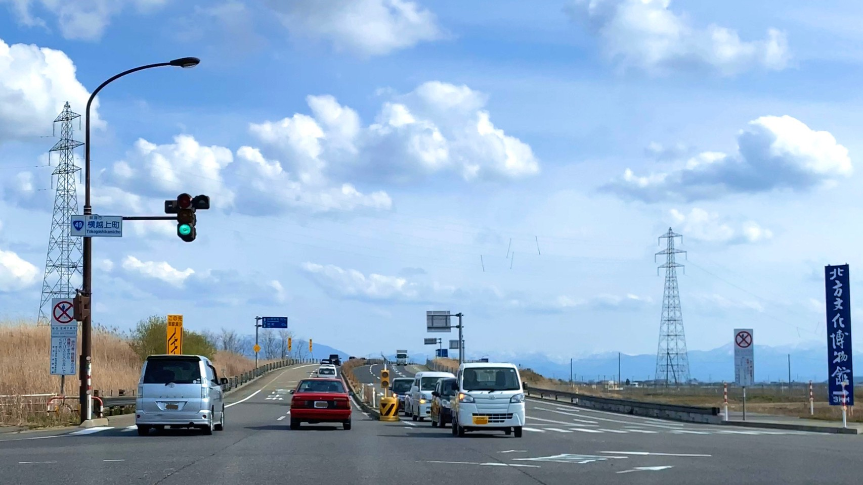 横雲バイパス・横越上町交差点（2020年4月）